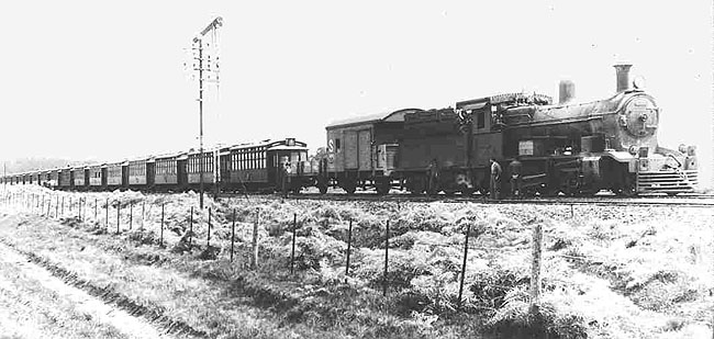 Tren formado con la flota rumbo a Bs.As., en Bahía Blanca, Provincia de Buenos Aires, Argentina.